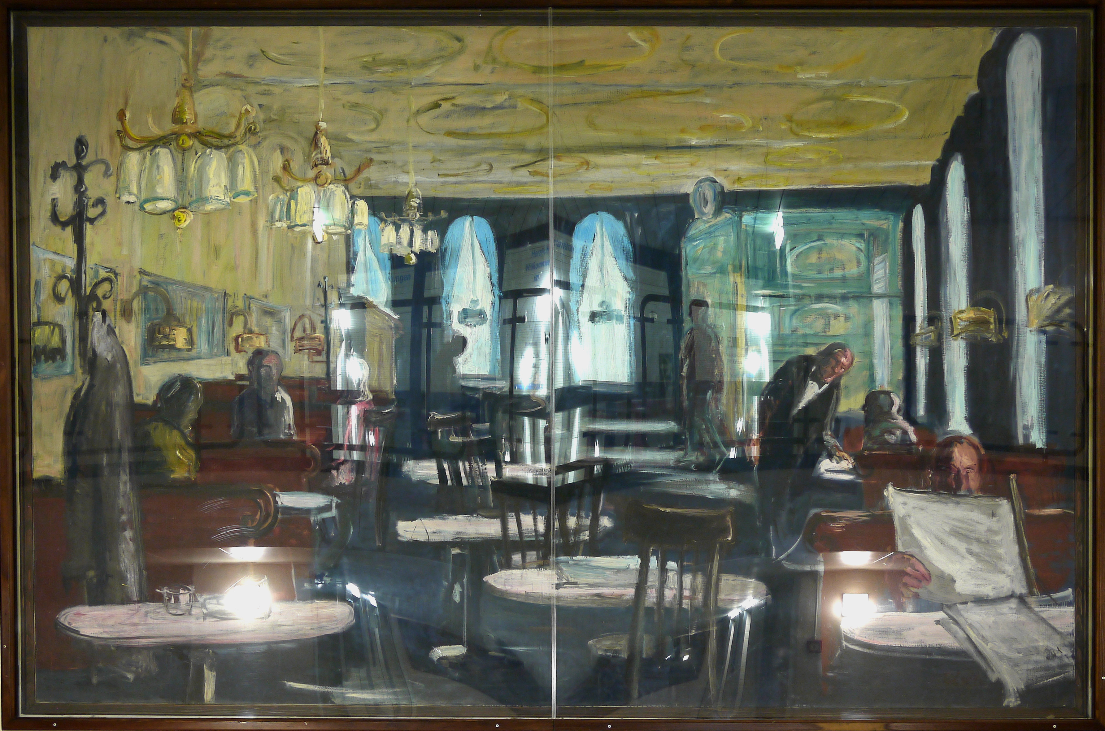 Alterlaa Kunst am Bau Georg Eisler "Großes Kaffeehaus“ Öl auf Leinwand